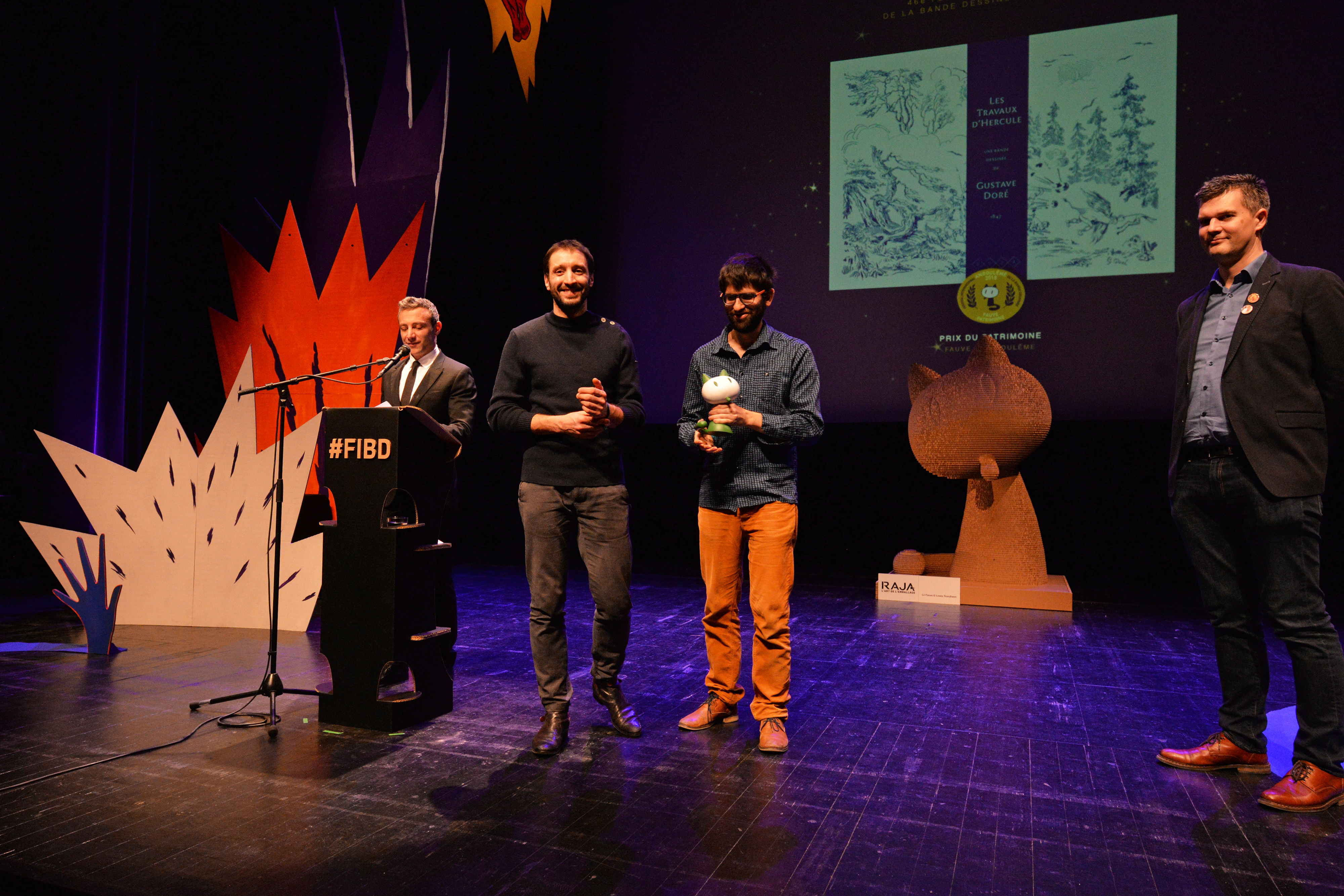 Cérémonie de remise des prix du Festival International de la Bande Dessinée d'Angoulême 2019.